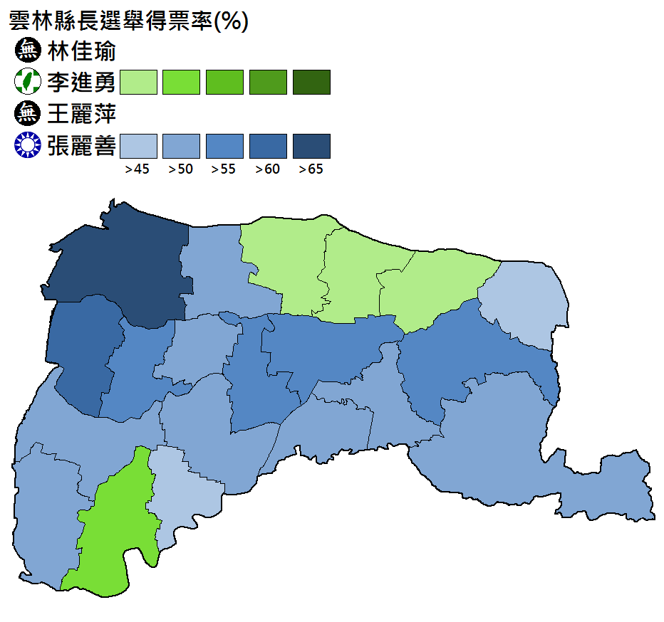 雲林縣長選舉得票分布。